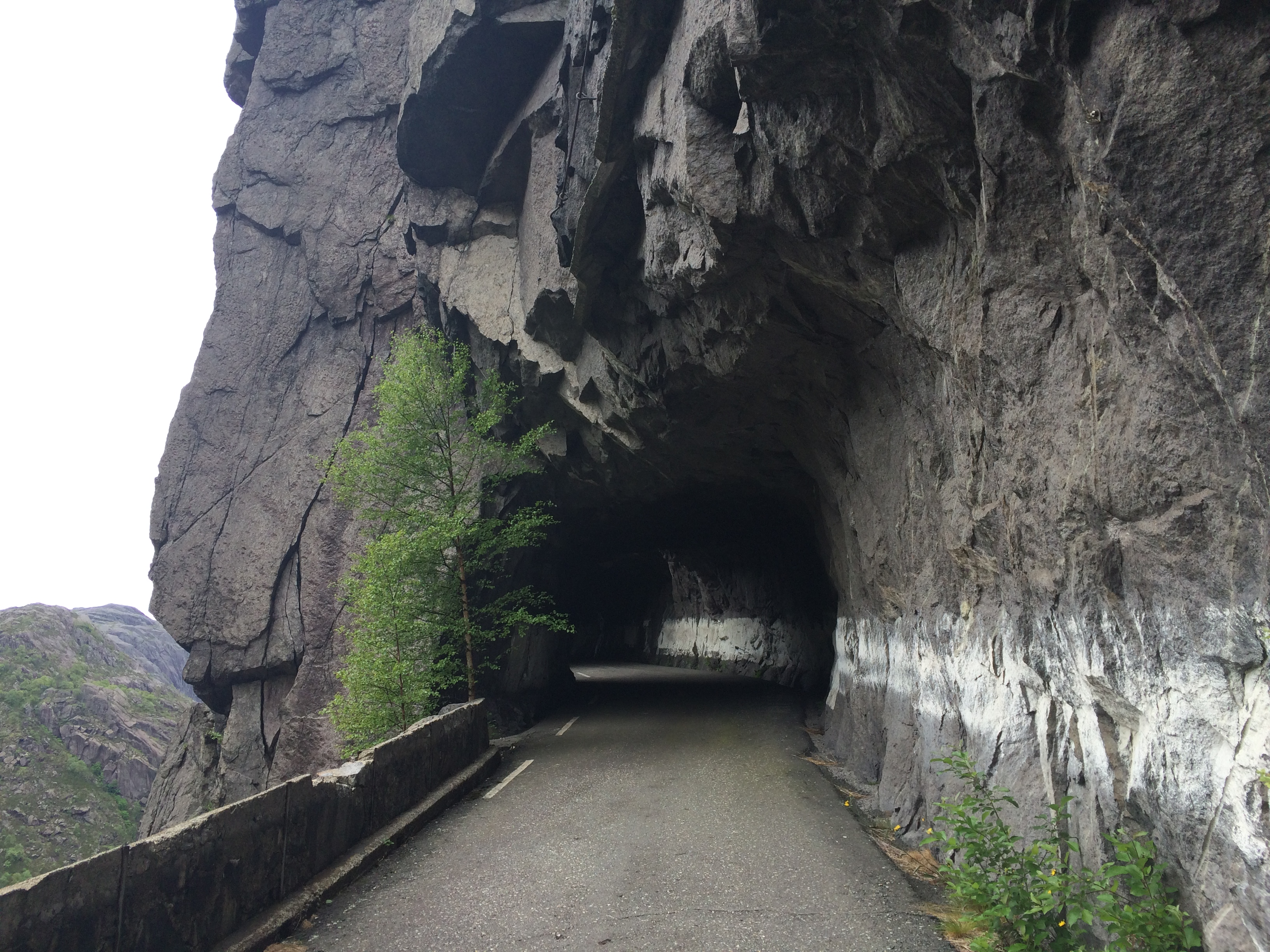 Jøssingfjord